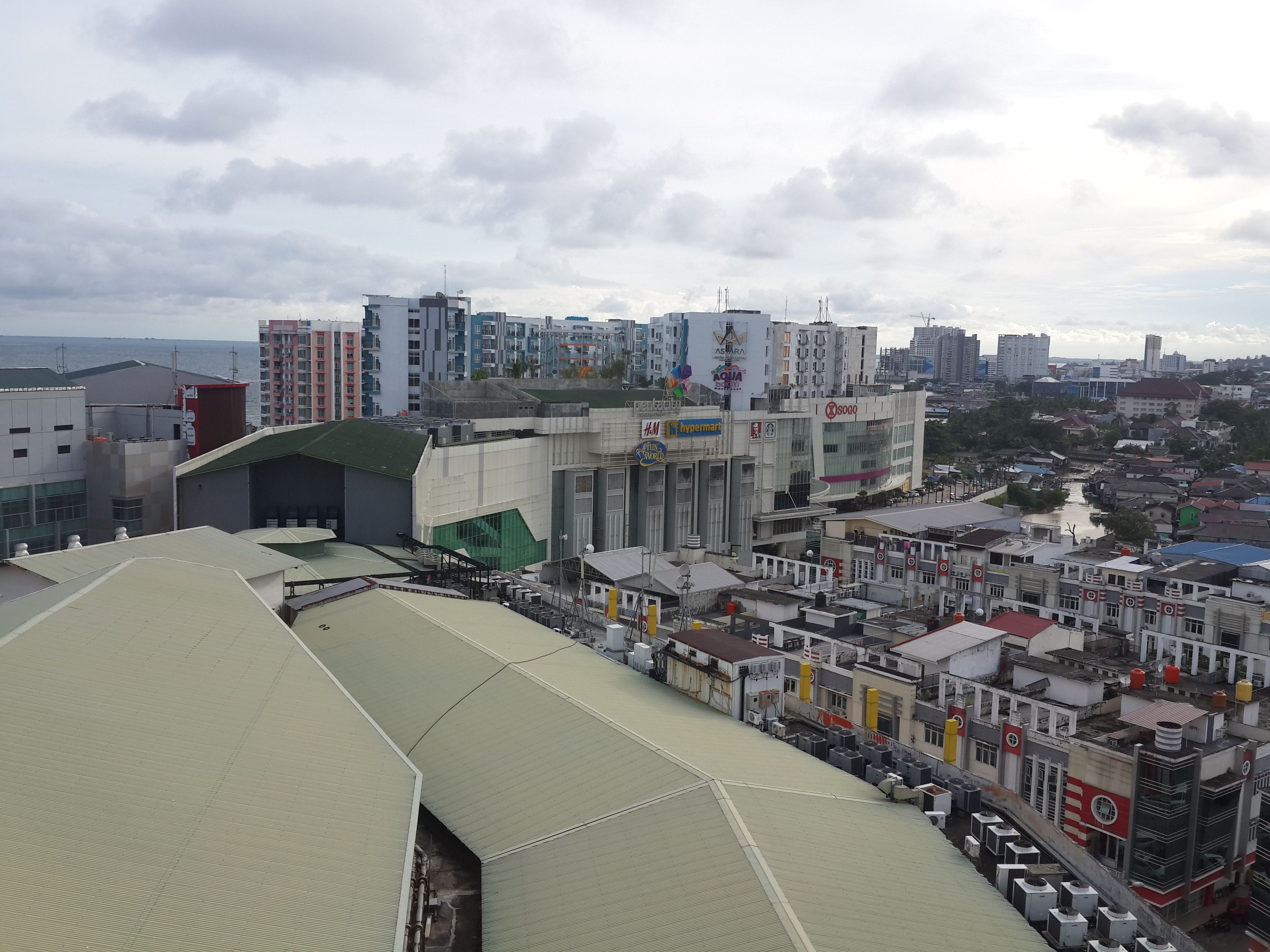 20180512_163355 Urban dense of Balikpapan